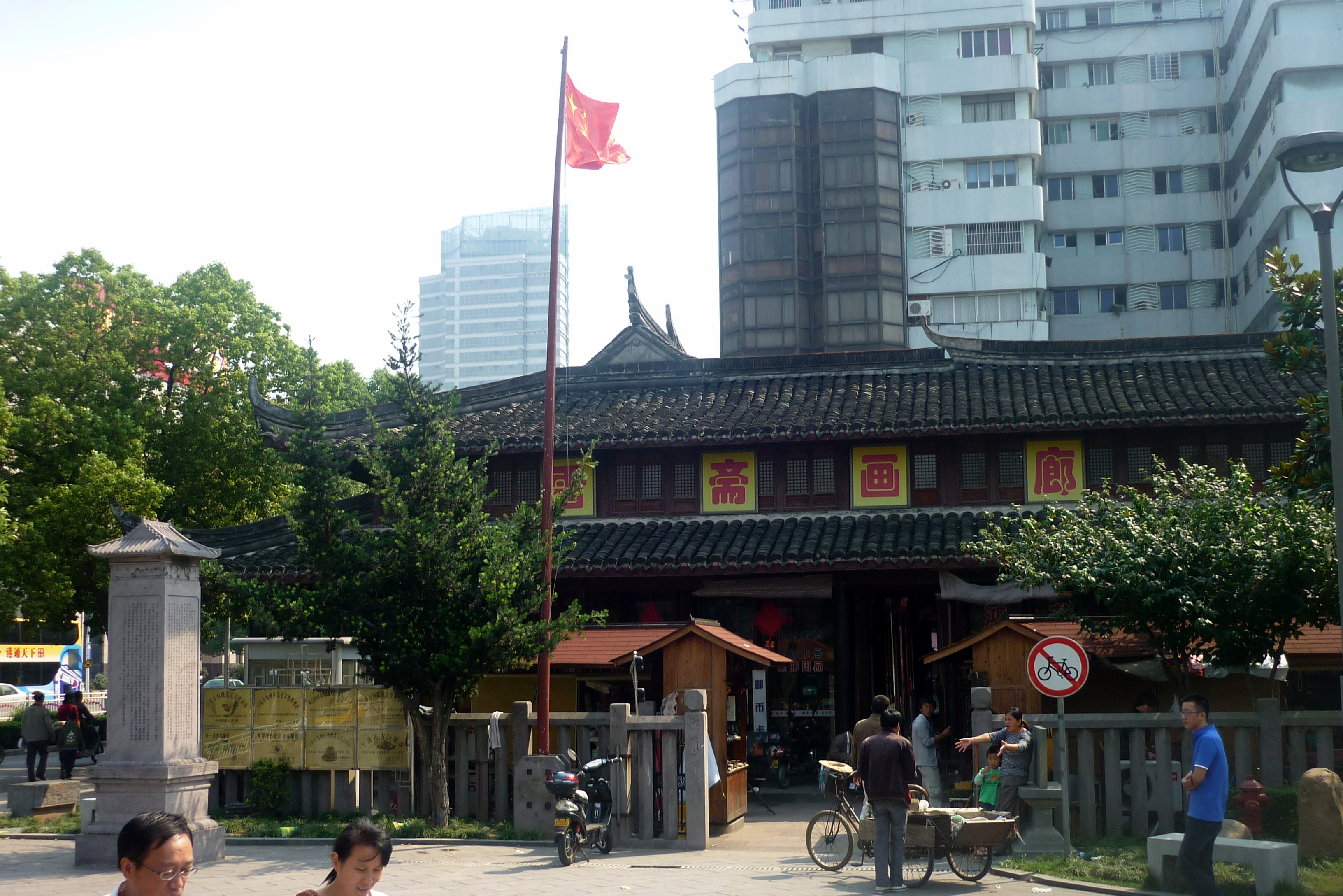 宁波海曙范宅